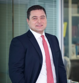 Михаил Ломтадзе